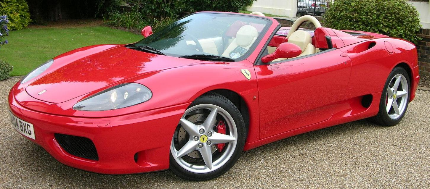 2004 Ferrari 360 Spider F1